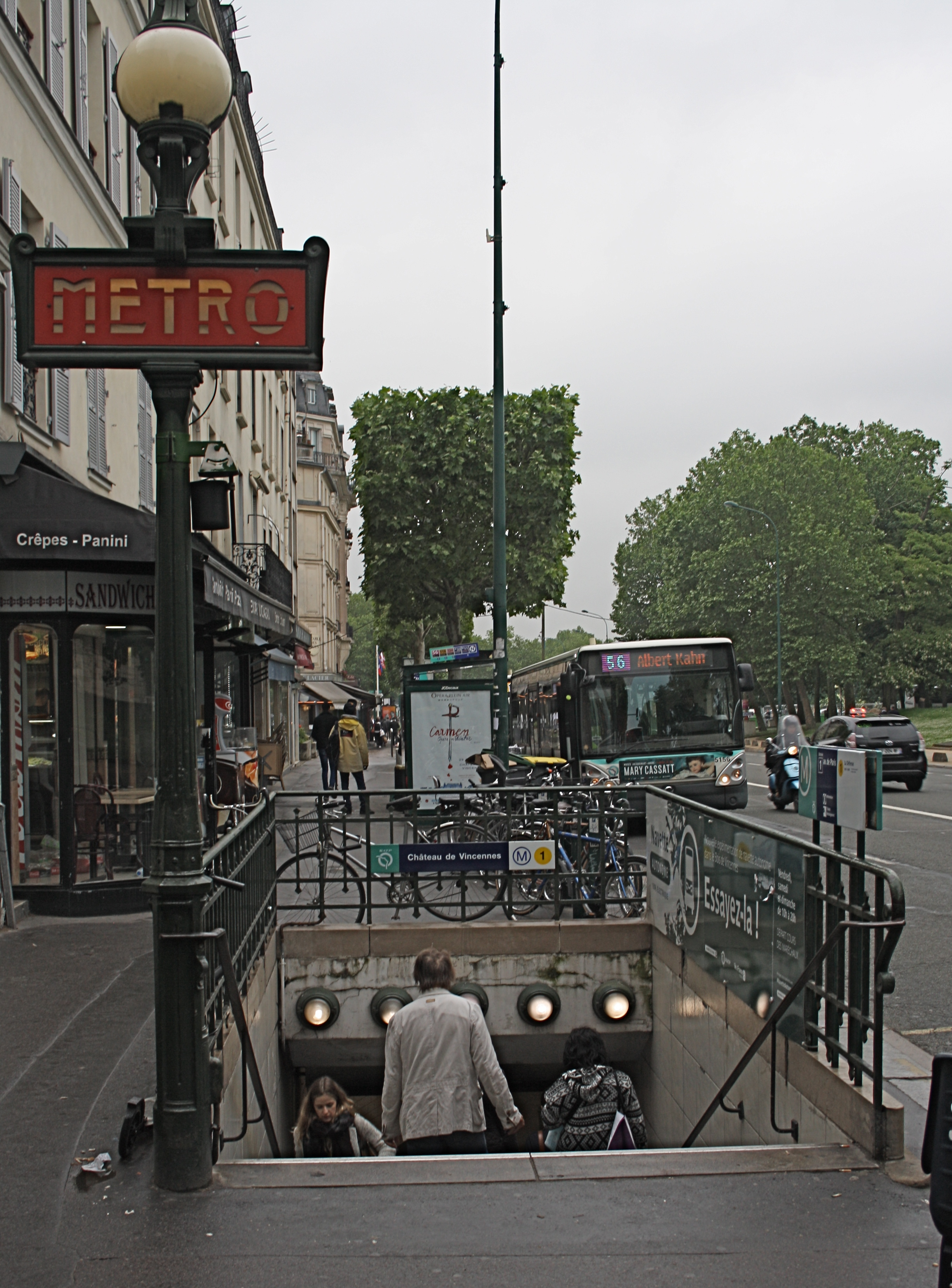 Zugang zur Métrostation Château de Vincennes in Paris